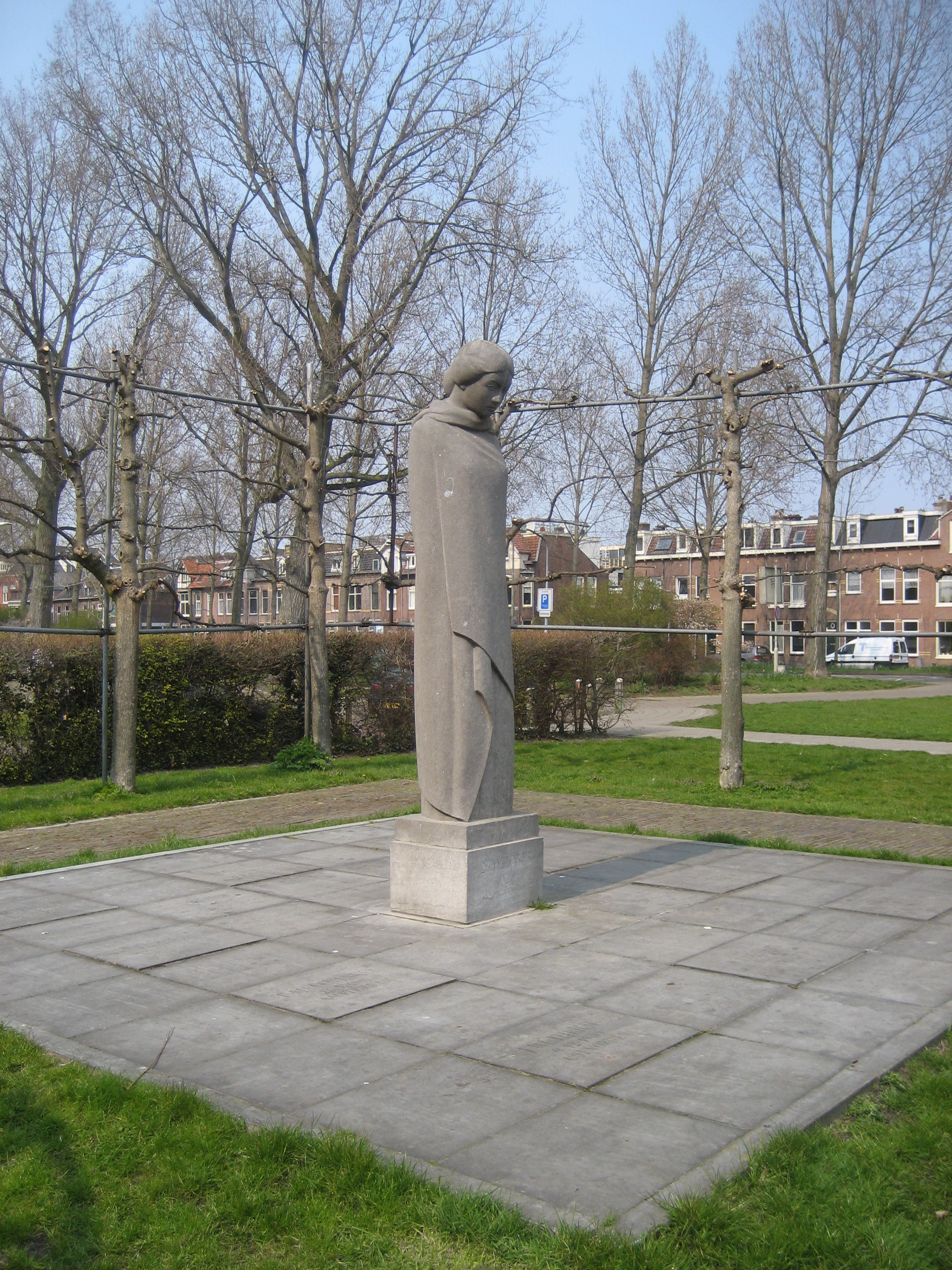 Foto van Treurende Vrouw (Haarlem) Oorlogsmonument: Het monument 'Treurende Vrouw' in Haarlem is een in Namense natuursteen uitgevoerd beeld van een staande vrouwenfiguur. Het beeld is geplaatst op een voetstuk van natuursteen. Rondom het voetstuk liggen tien stenen met de namen van de omgekomen verzetsmensen. Adres: Westergracht, Haarlem. Onthulling 1949. Kunstenaar: Ludwig Oswald Wenckebach Memorial WW II, date: 1949, artist: Ludwig Oswald Wenckebach adres: Westergracht, Haarlem